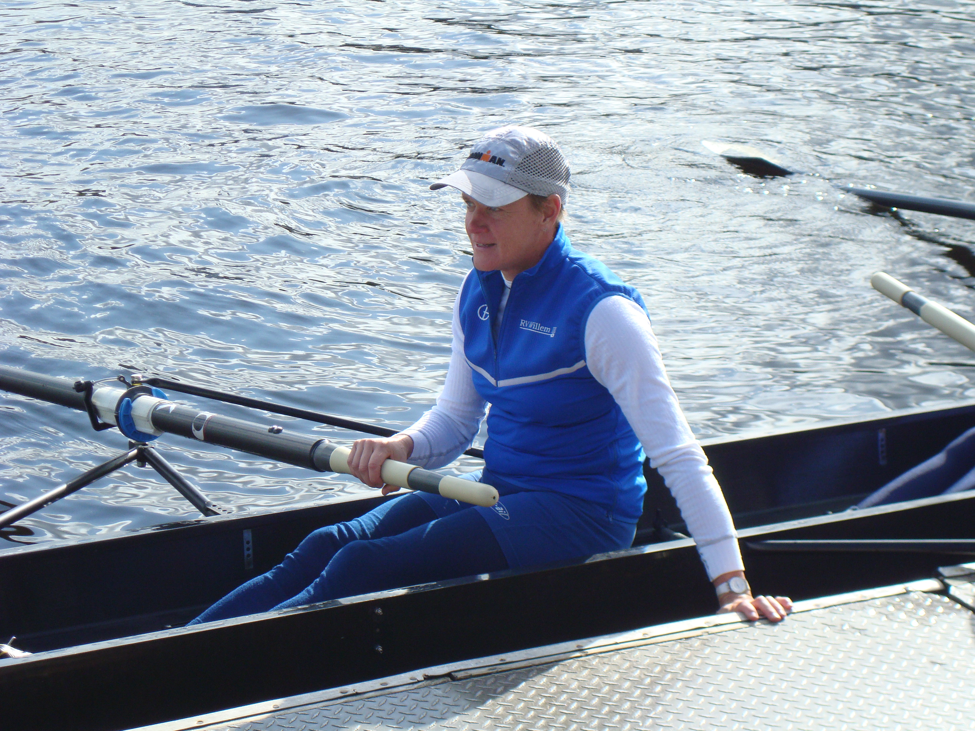 Marijke Zeekant (Medemblik, 12 december 1956) is een Nederlands triatlete, duatlete en roeister. -- roeiwedstrijd Boston